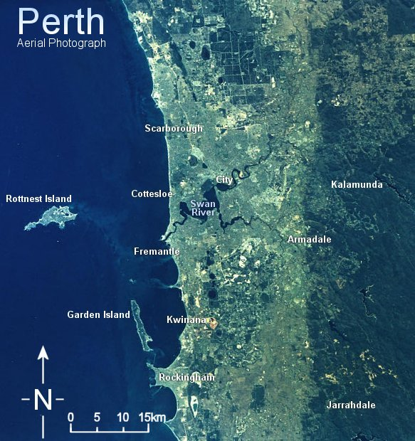 Perth (Australien) - Satellitenbild